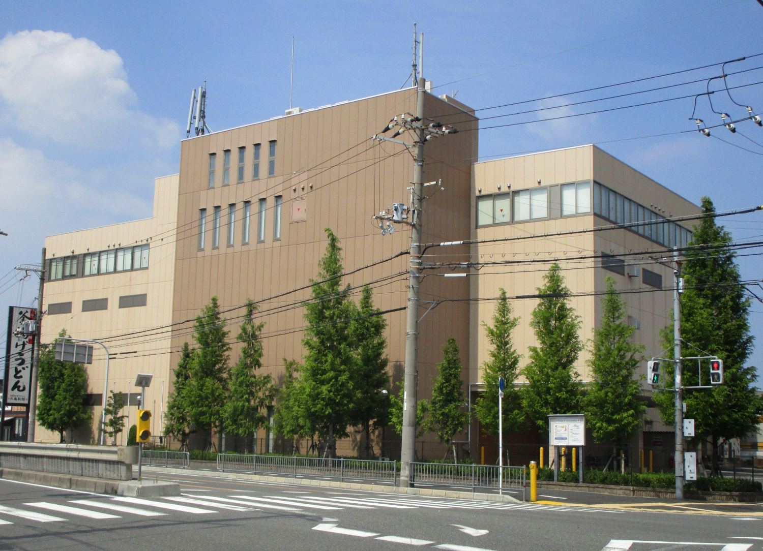 タケモトピアノ 本社ビル